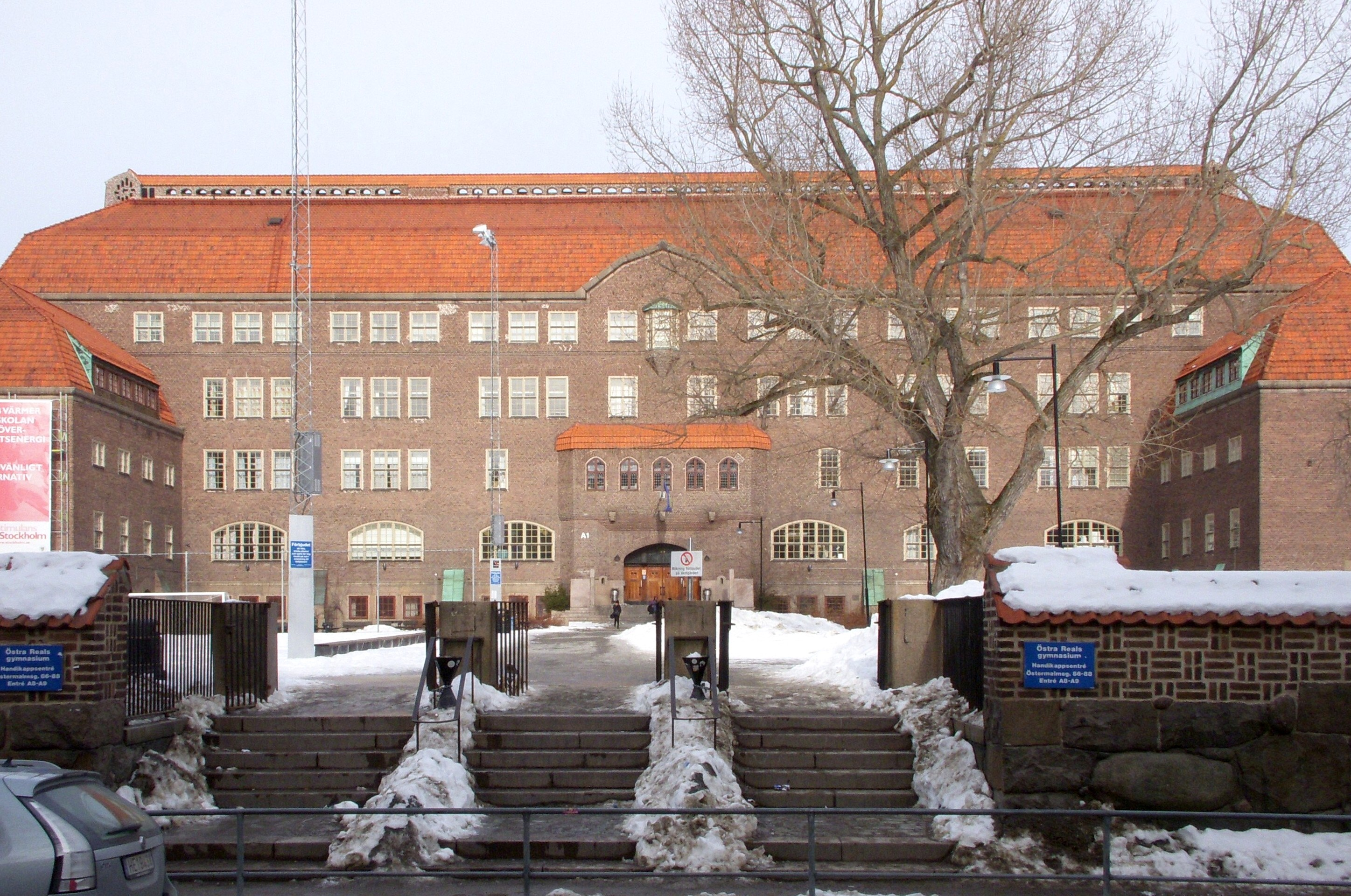 Östra Real, fasad mot Karlavägen